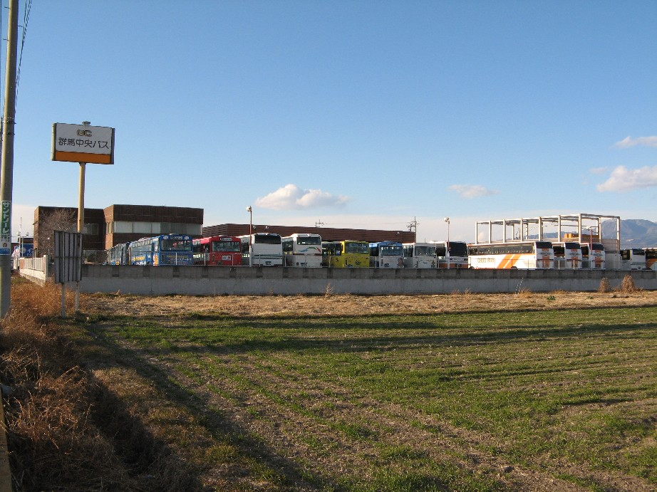 群馬中央バス本社および前橋営業所。公道上より撮影。